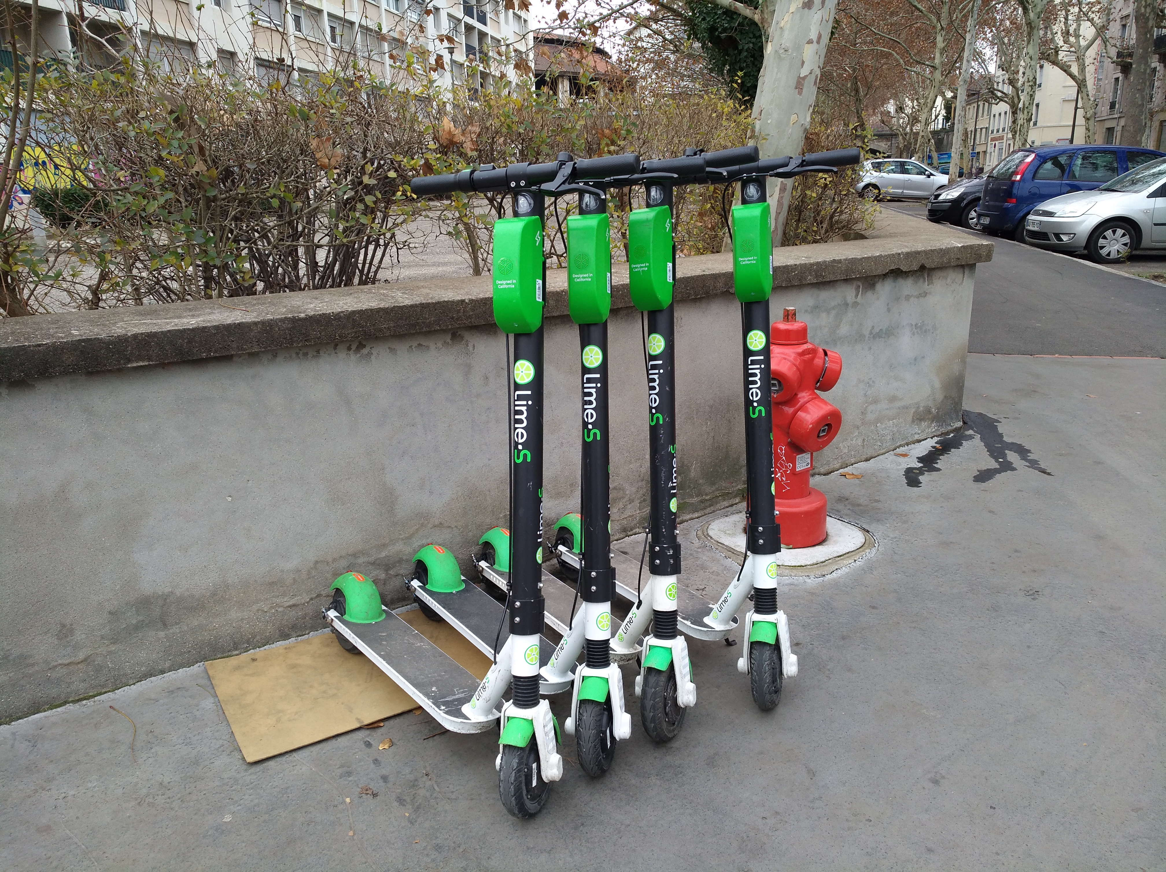 Trottinettes électrique LimeS stationnées à l'angle du cours Suchet et de la rue Claudius-Collonge, dans le 2e arrondissement de Lyon.